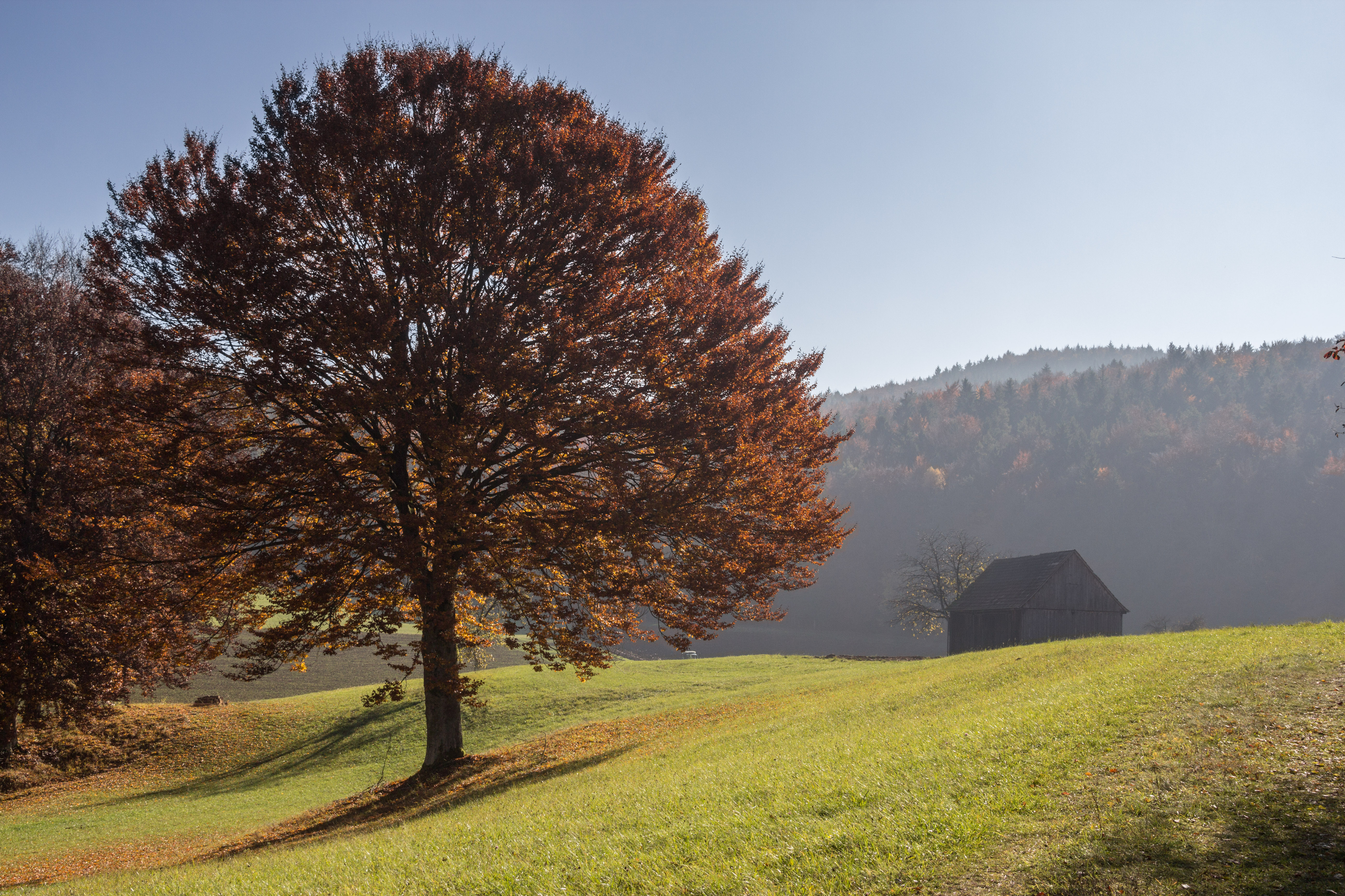 Einzelbaum auf Feld, Landschaftsschutzgebiet Högenbachtal, Lichtenegg, Beselberg mit westlichem Birgland, Fürnried